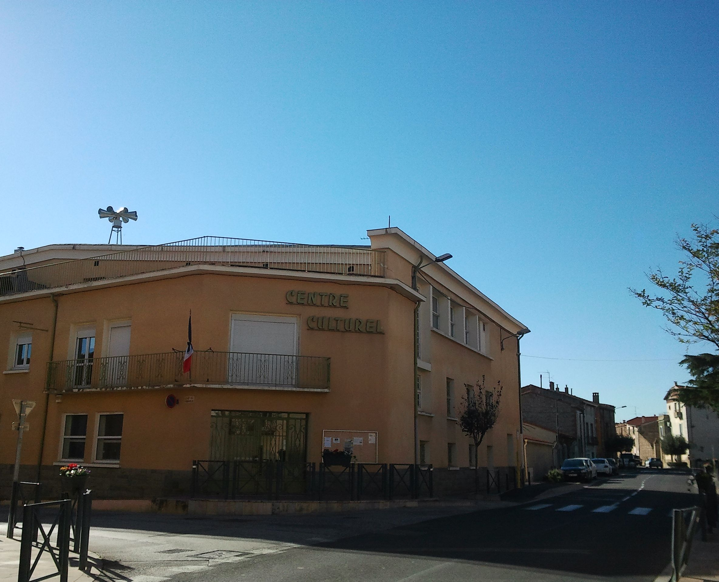 Le centre culturel et l'avenue du Canigou à Pézilla-la-Rivière